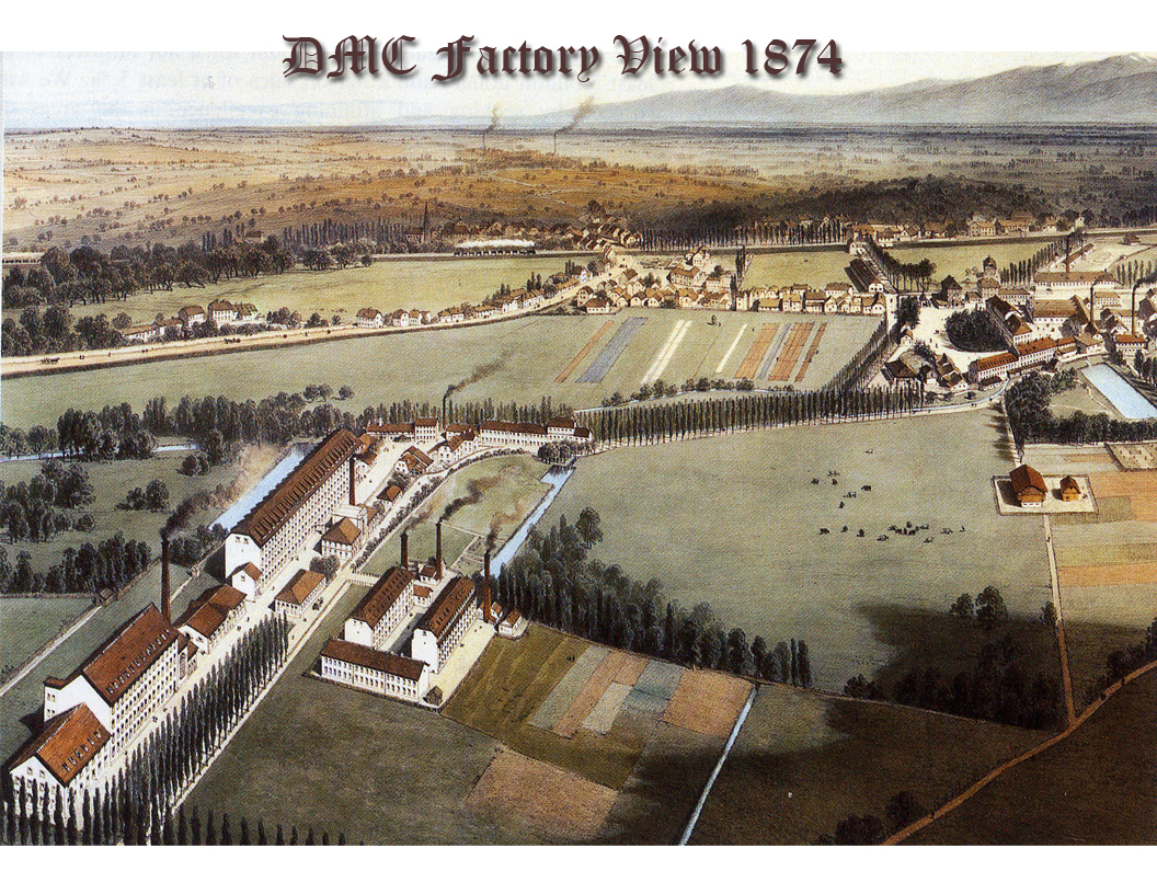 фабрика, нитки